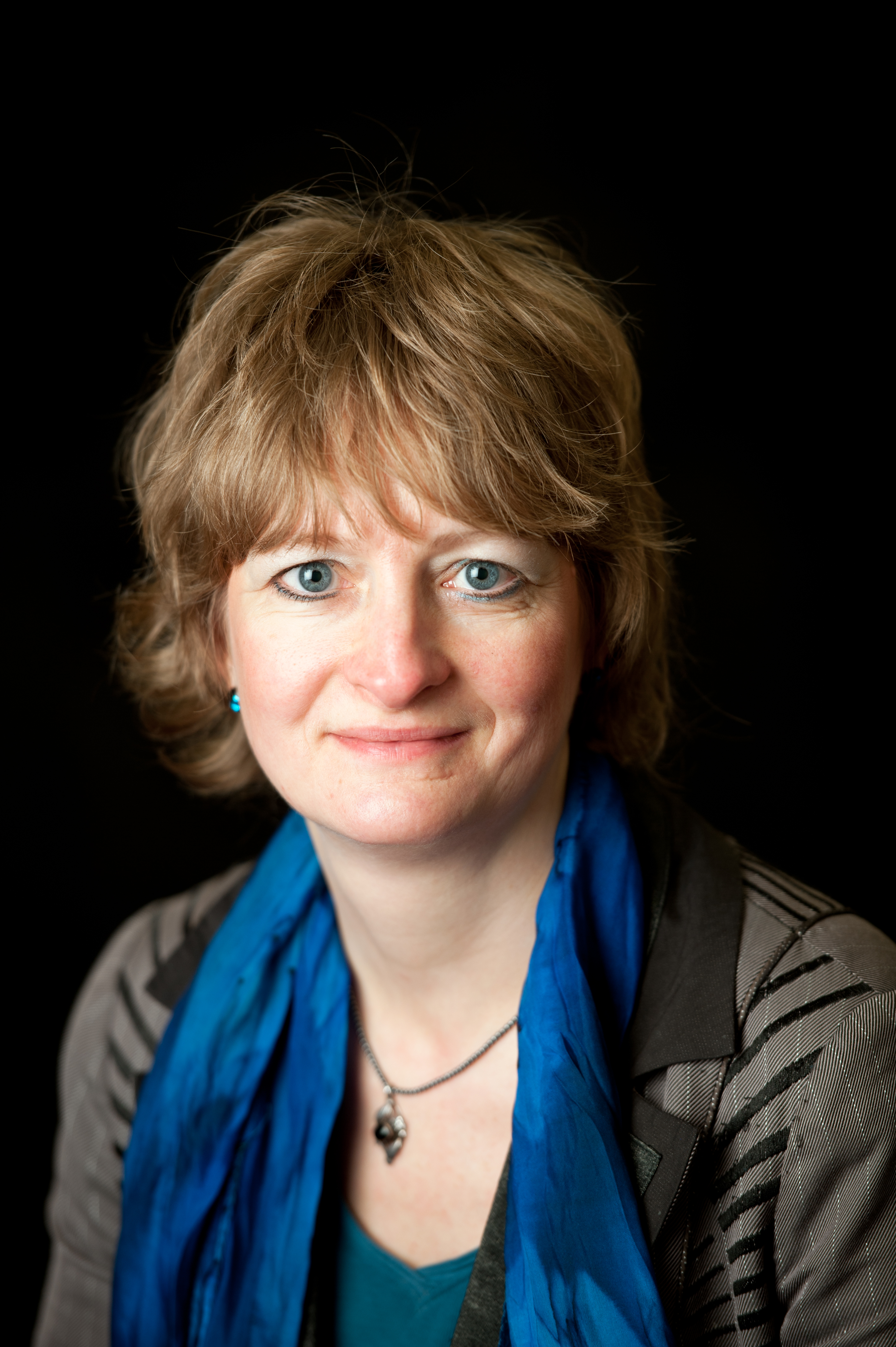 Line Barfod, Enhedslisten (EL) Danmark.